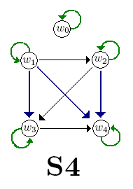 S4 frame